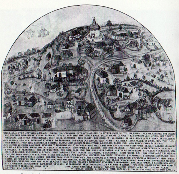 Das Pestbild von 1583 in der Kirche von Großrückerswalde